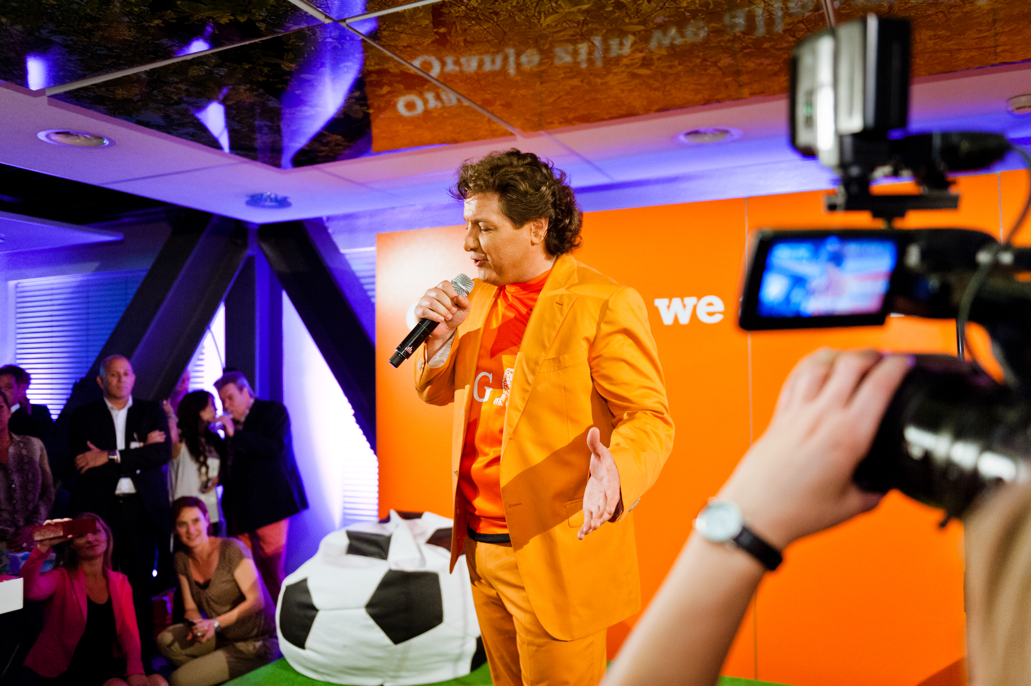 Met de lancering van de EK-commercial vond dinsdagmiddag 15 mei de officiële aftrap plaats van de EK-activiteiten van ING, hoofdsponsor van Oranje. De muziek van de commercial is van Rene Froger die de medewerkers van de ING verraste met een mini-optreden en de EK hit ‘Samen’ ten gehore bracht. ‘Samen’ is de soundtrack van de EK commercial van de ING. Het thema van de campagne van de ING is ‘Oranje zijn we allemaal’. Met de commercial, het penaltyspel Koning Penalty, het traditionele EK onderzoek EKnomie en een intensieve samenwerking met grote mediapartners wil ING een substantiële bijdrage leveren aan het Oranje gevoel van Nederland in de aanloop naar en tijdens het Europees Kampioenschap voetbal in Polen en Oekraïne. foto: Bas Arps/ANP